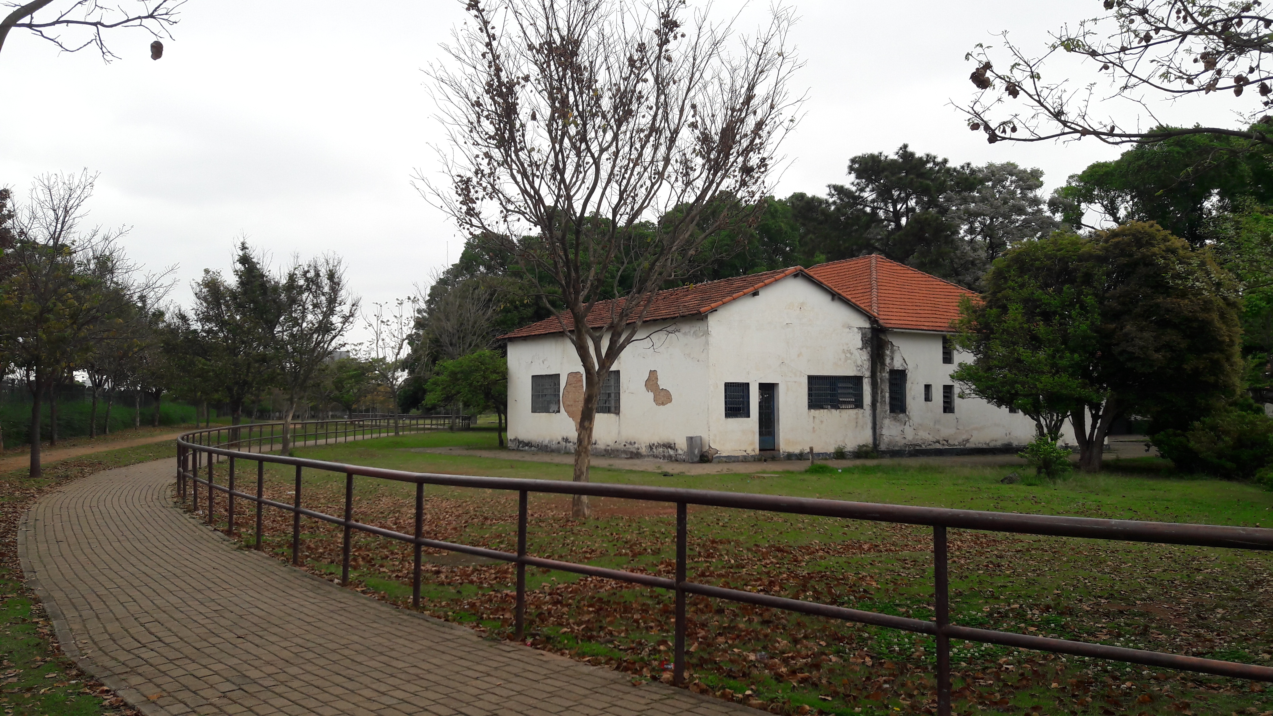 Visão de um dos casarões no parque do trote na Vila Guilherme, em São Paulo (SP), Brasil.